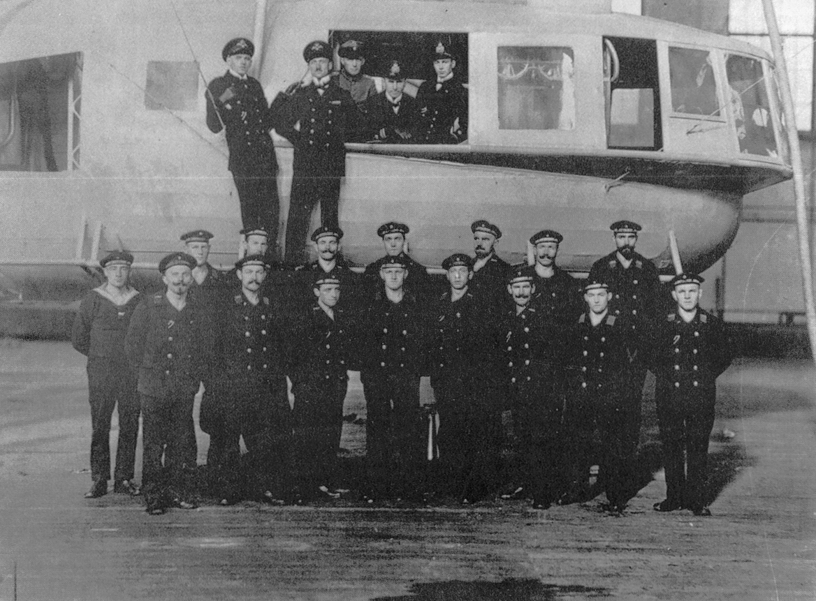 L 59 Besatzung uniformiert am Afrika-flug, im Fenster Grußendorf, Bockholt und Maas